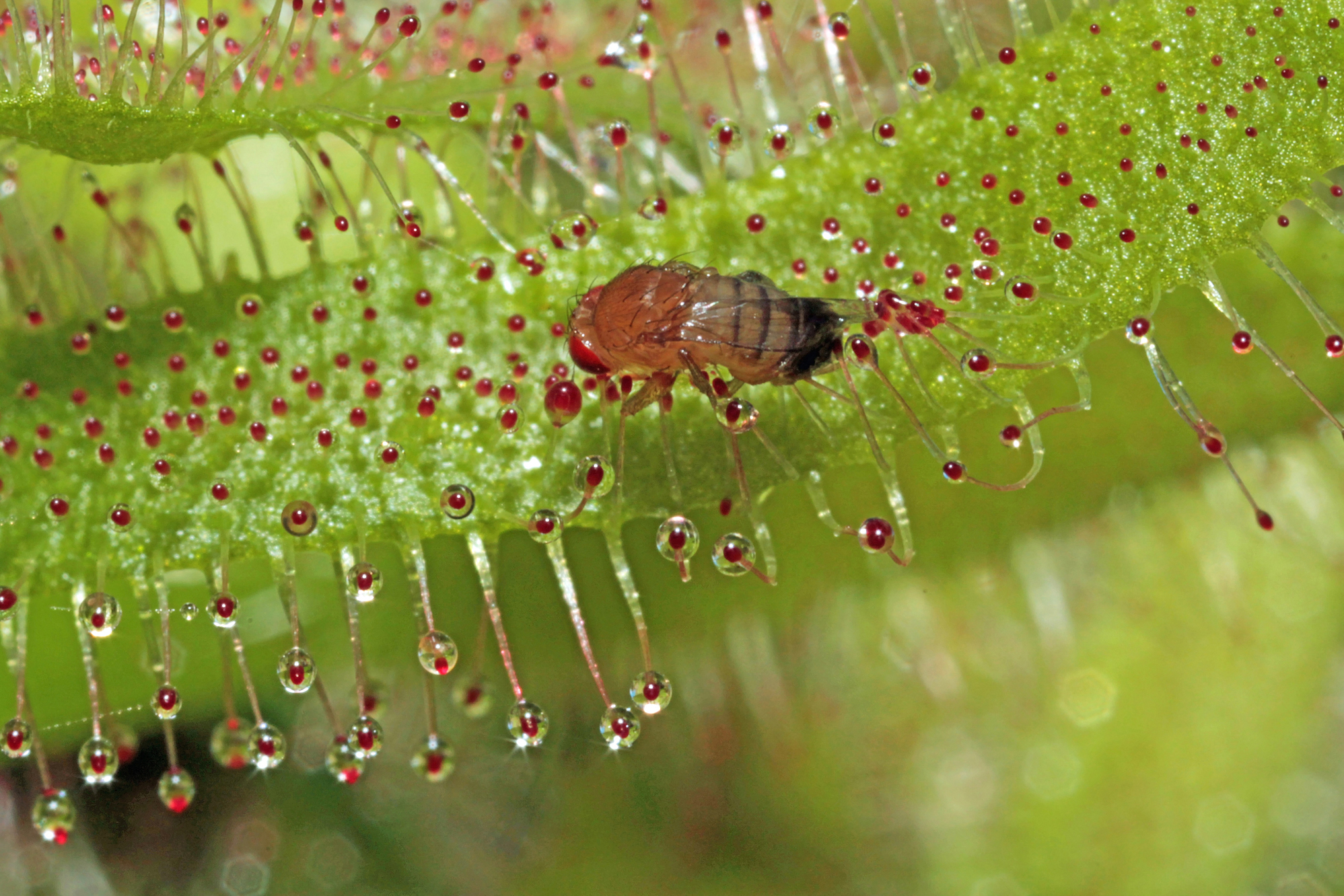 Drosophila melanogaster ♀, Drosera capensis